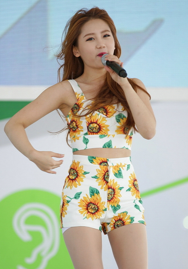 송하예 C&M 착한콘서트